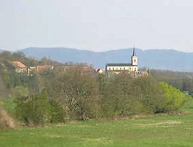 église de Bermont (Territoire de Belfort) sur fond de ligne bleue des Vosges Photo prise le 20/04/2004 par LP90. Licence GFDL LP90 avril 2004